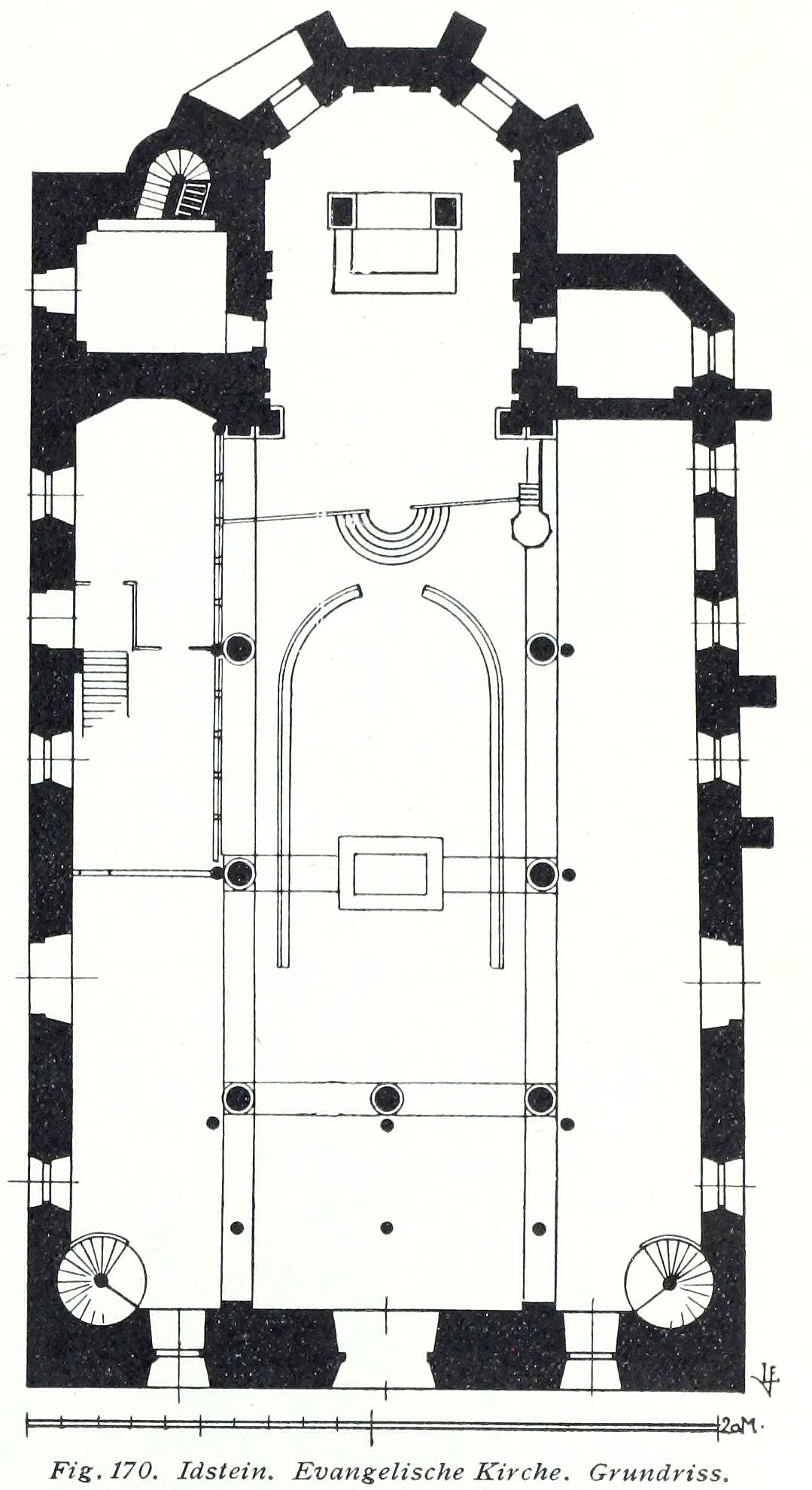 Idstein Evangelische Kirche Grundriss